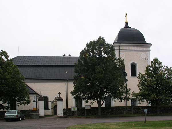 Kimstad kyrka, långsida. Foto: Xauxa 2003